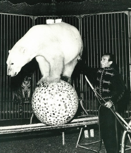 Il domatore: Liborio Sfalanga detto Giovanni